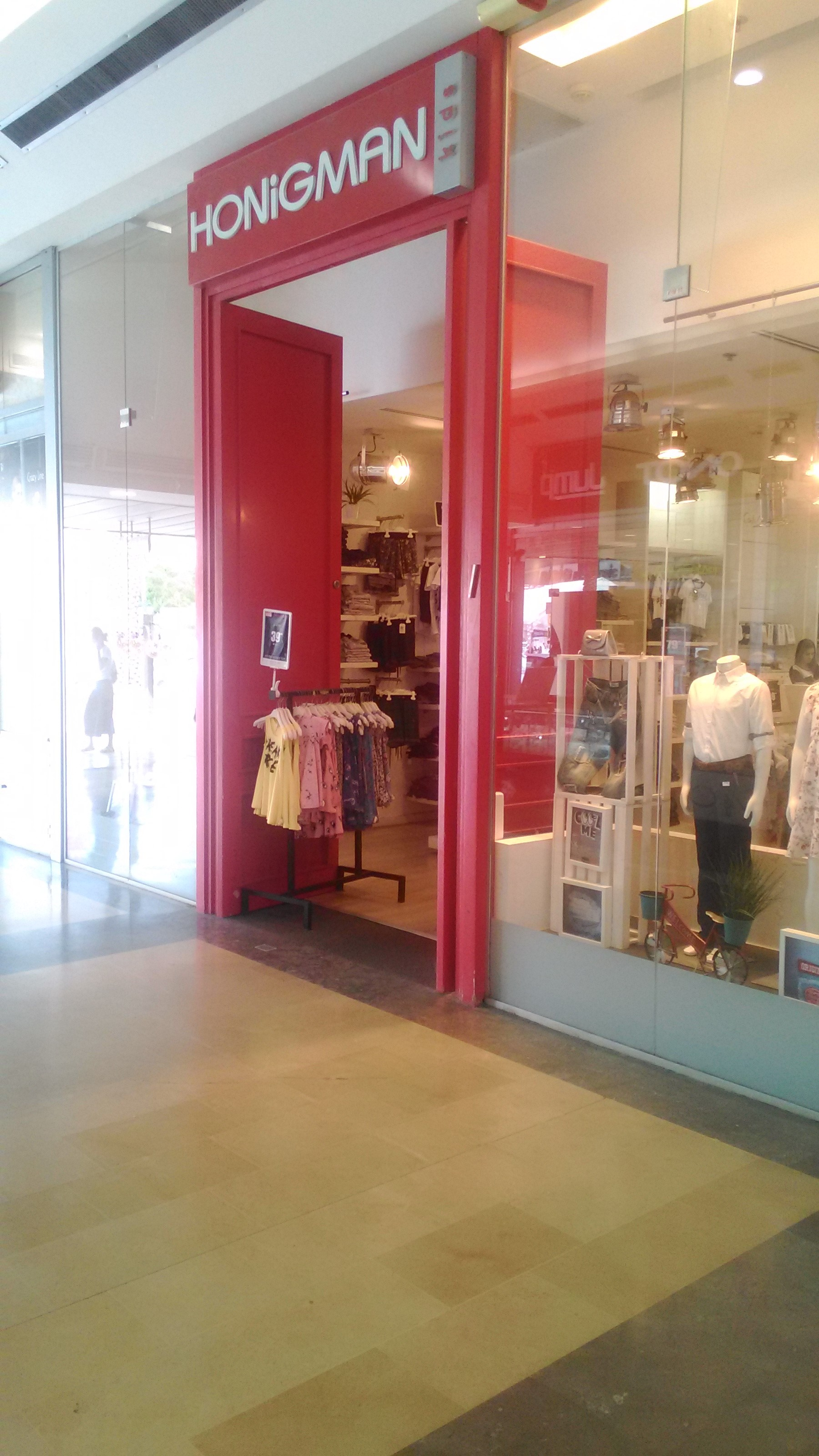 סניף הוניגמן קדס